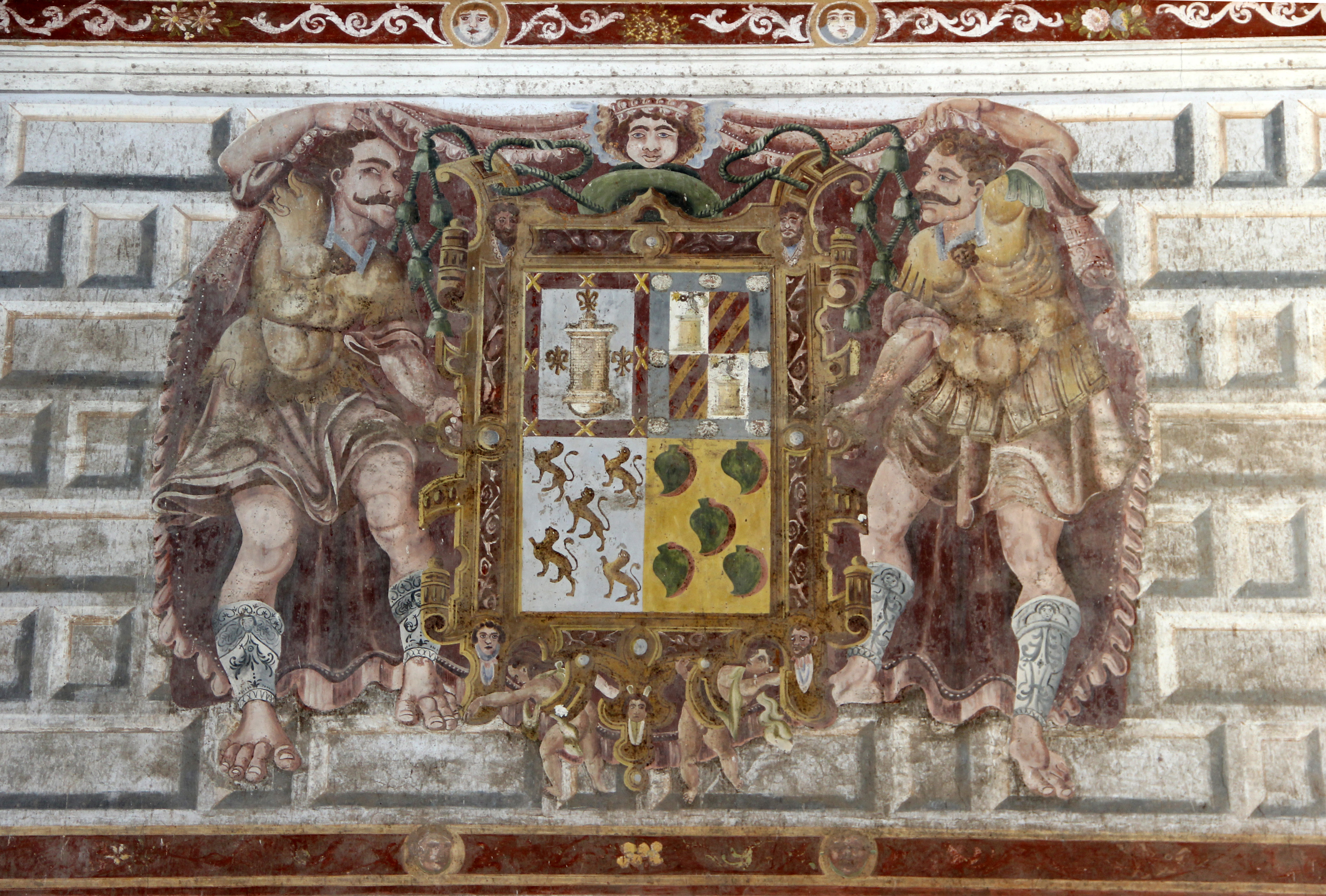 Fresque murale de l'Hospital de Santiago à Ubeda. Vers 1570.